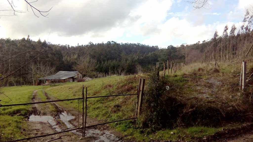 Vista de Mugardos, Pedroso, Narón.